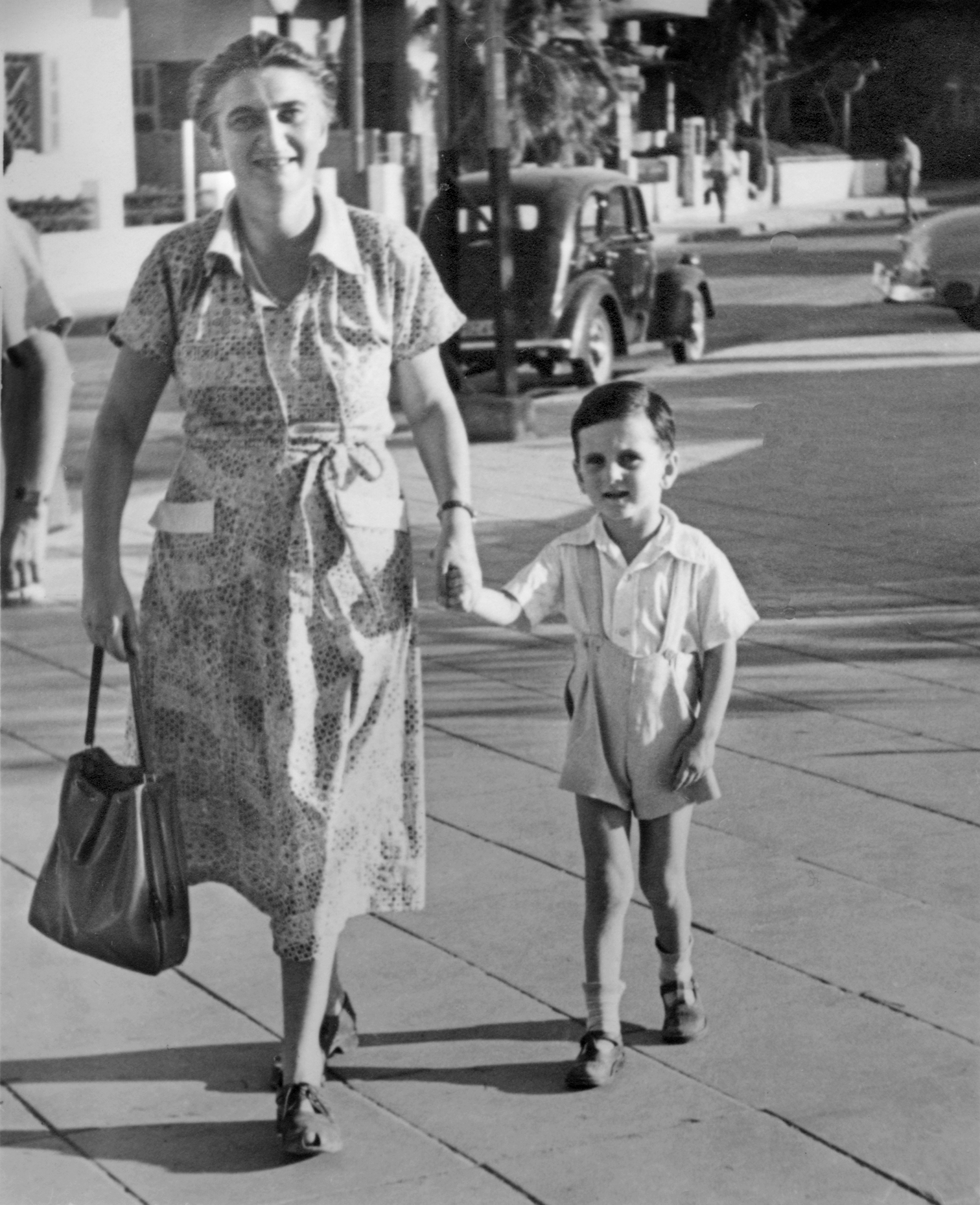 בתיה ברמן ובנה עמנואל, תל אביב בשנות החמישים